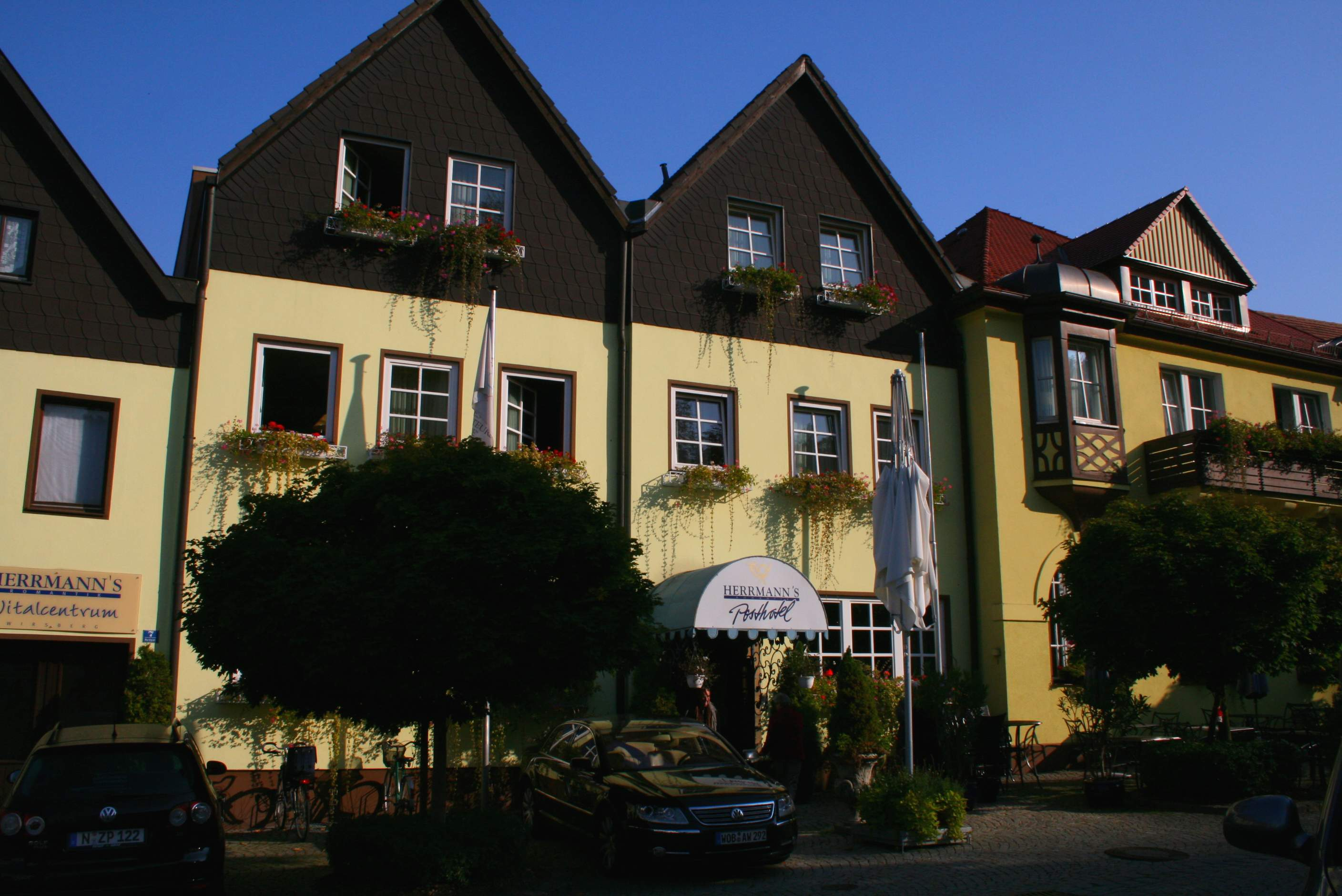 Herrmanns Posthotel am Marktplatz in Wirsberg